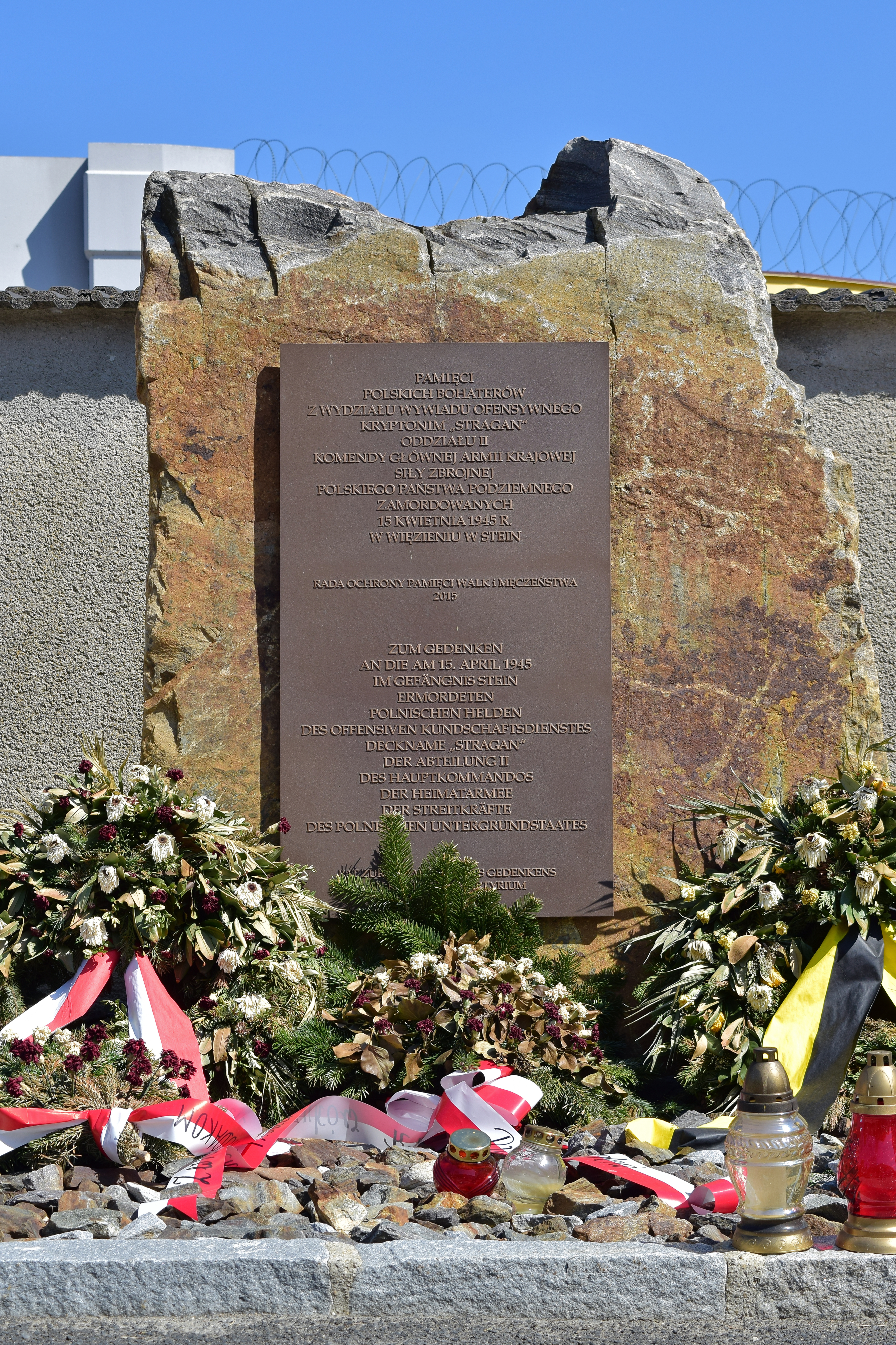 Gedenkstein am Friedhof Krems-Stein für 1945 in Zuchthaus Stein hingerichtete polnische Widerstandskämpfer